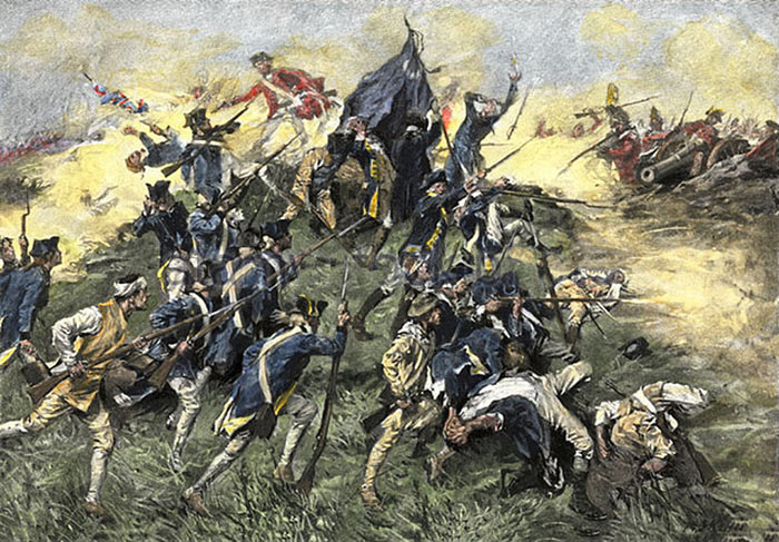 British-attack-on-american-forces-in-savannah-georgia-in-the-revolutionary